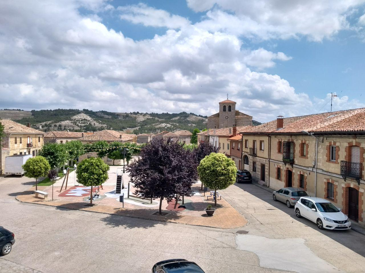 Vista de la Plaza Mayor de Villahán, provincia de Palencia, España. Al fondo la Iglesia de San Andrés.